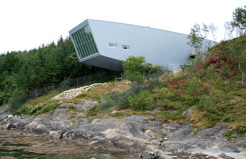 Petter Dass-senteret, Alstahaug, Norway. Built 2007. Architect: Snøhetta.